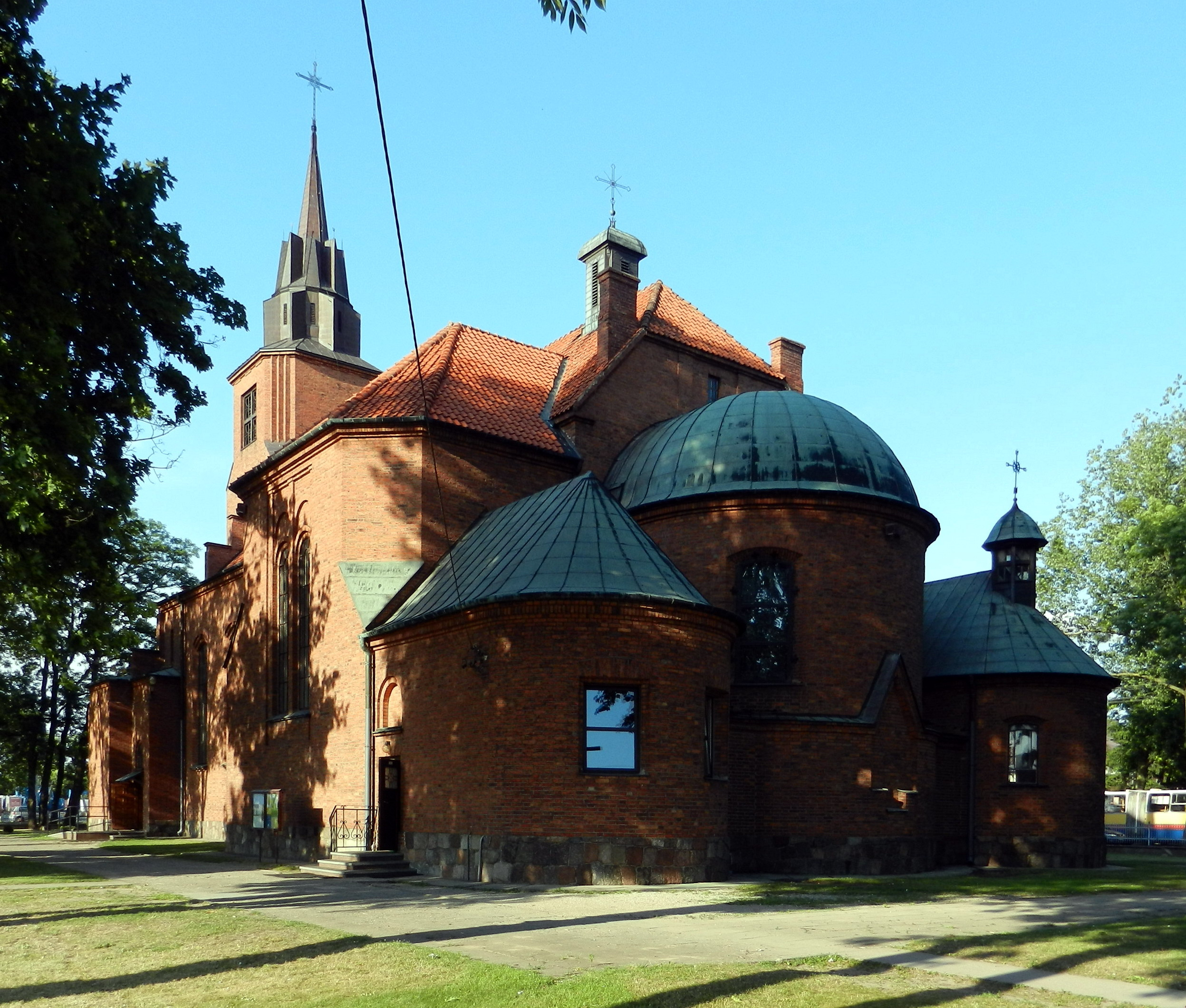 Kościół Najświętszego Serca Pana Jezusa w Płocku.